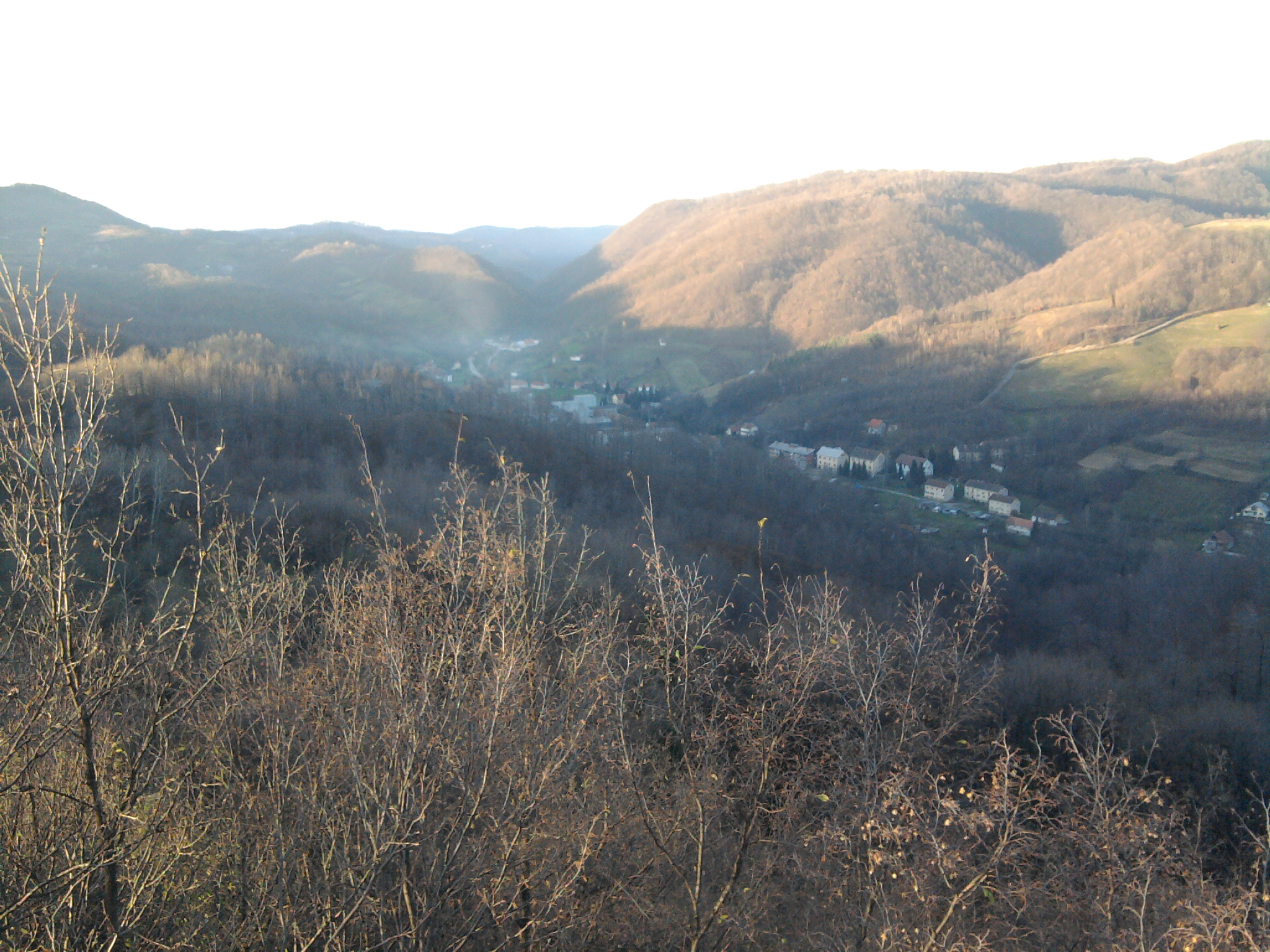 Зајача, Лозница.